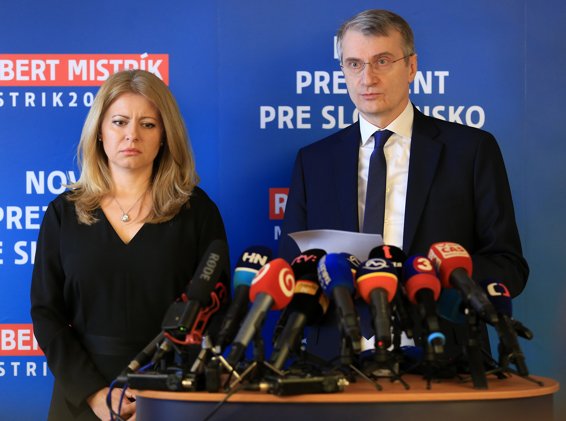 Robert Mistrík na tlačovej konferencii v hotely Falkensteiner oznamuje svoje odstúpenie z prezidentskej kampane 2019 a vyjadruje svoju podporu pre Zuzanu Čaputovú ako kandidátku na prezidenta.